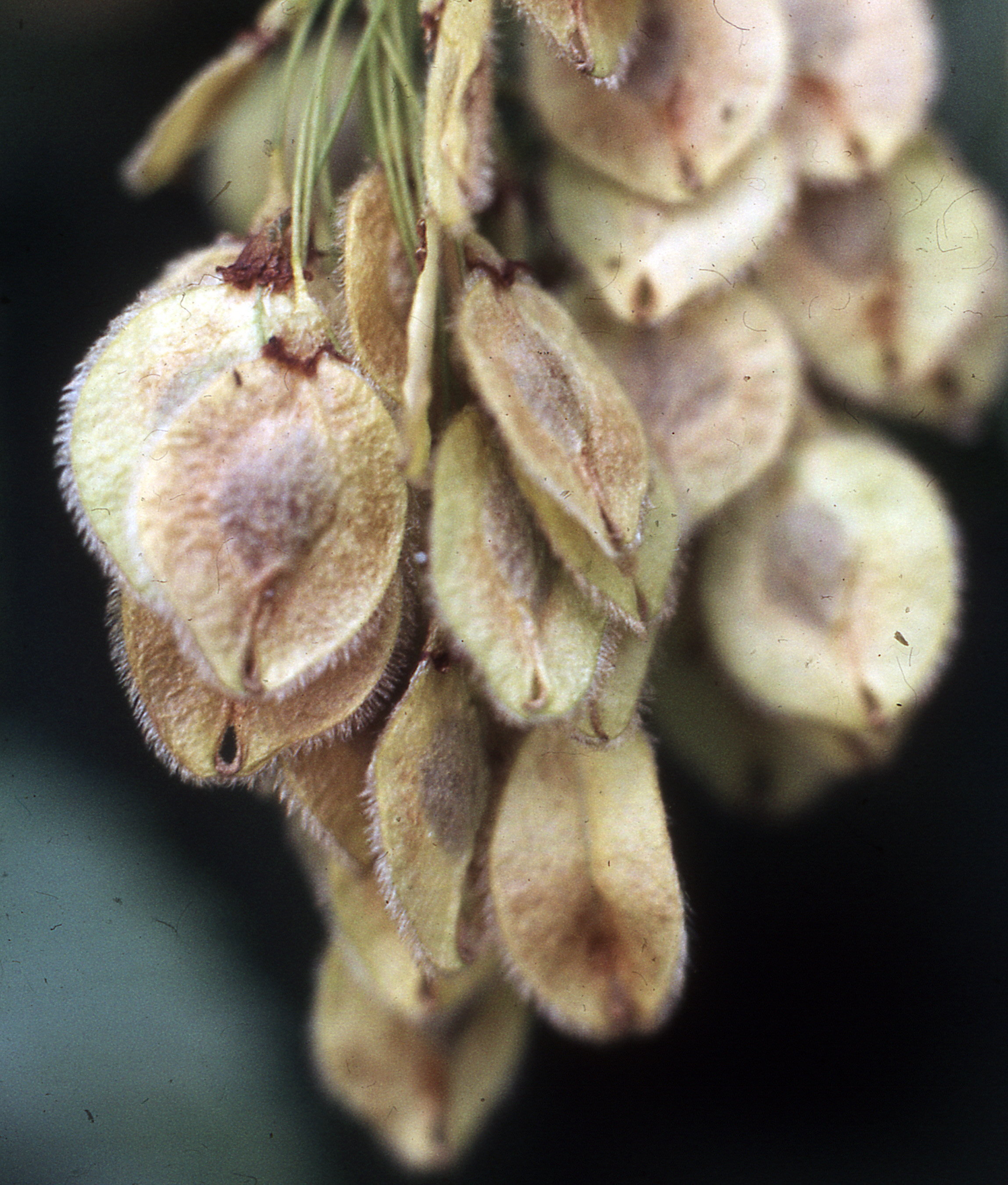 Плодови веза (Ulmus effusa). Суботичка пешчара 12. мај 1985. (фото: Михаило Грбић)